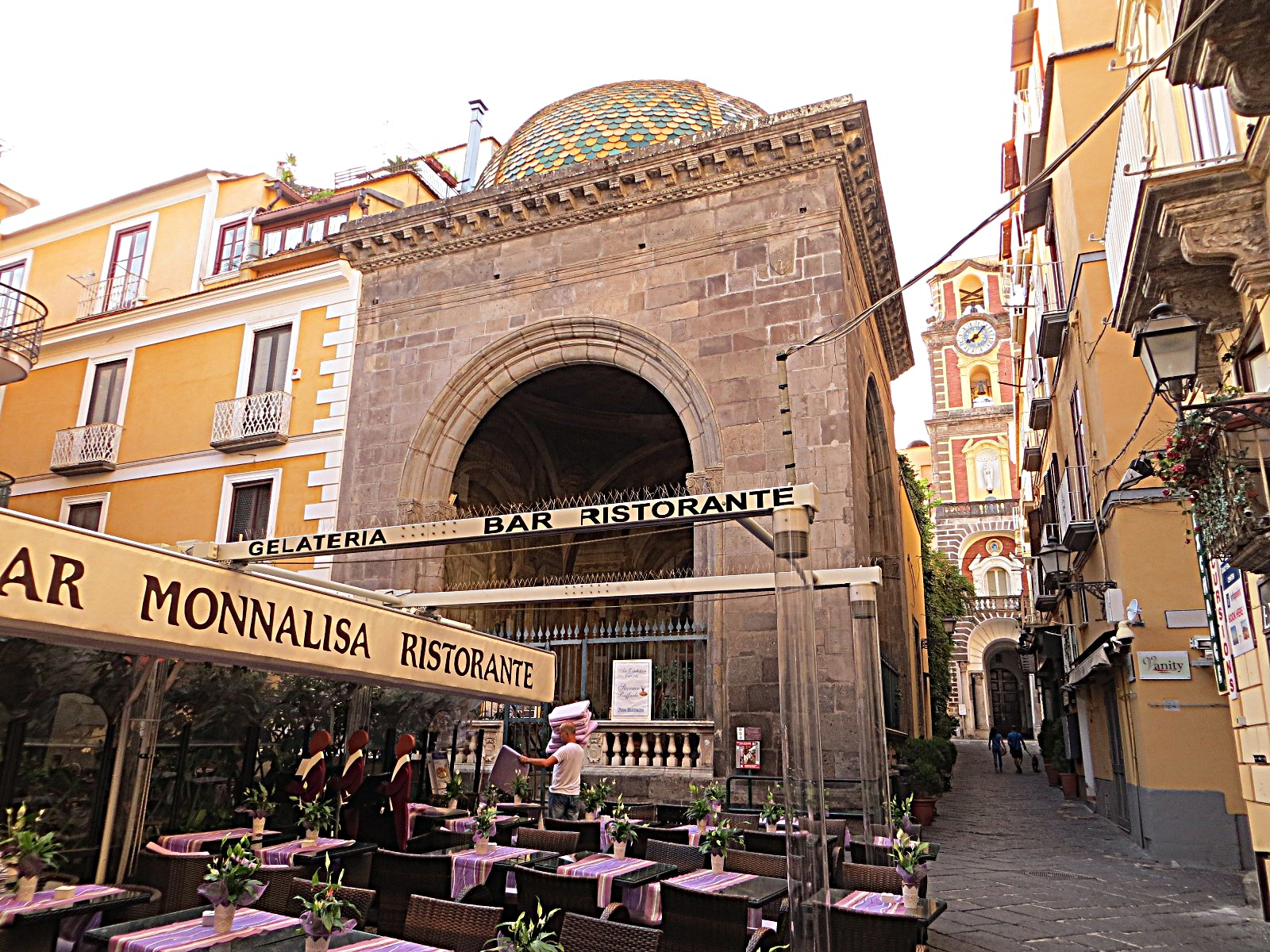 Sedile Dominova, Sorrento